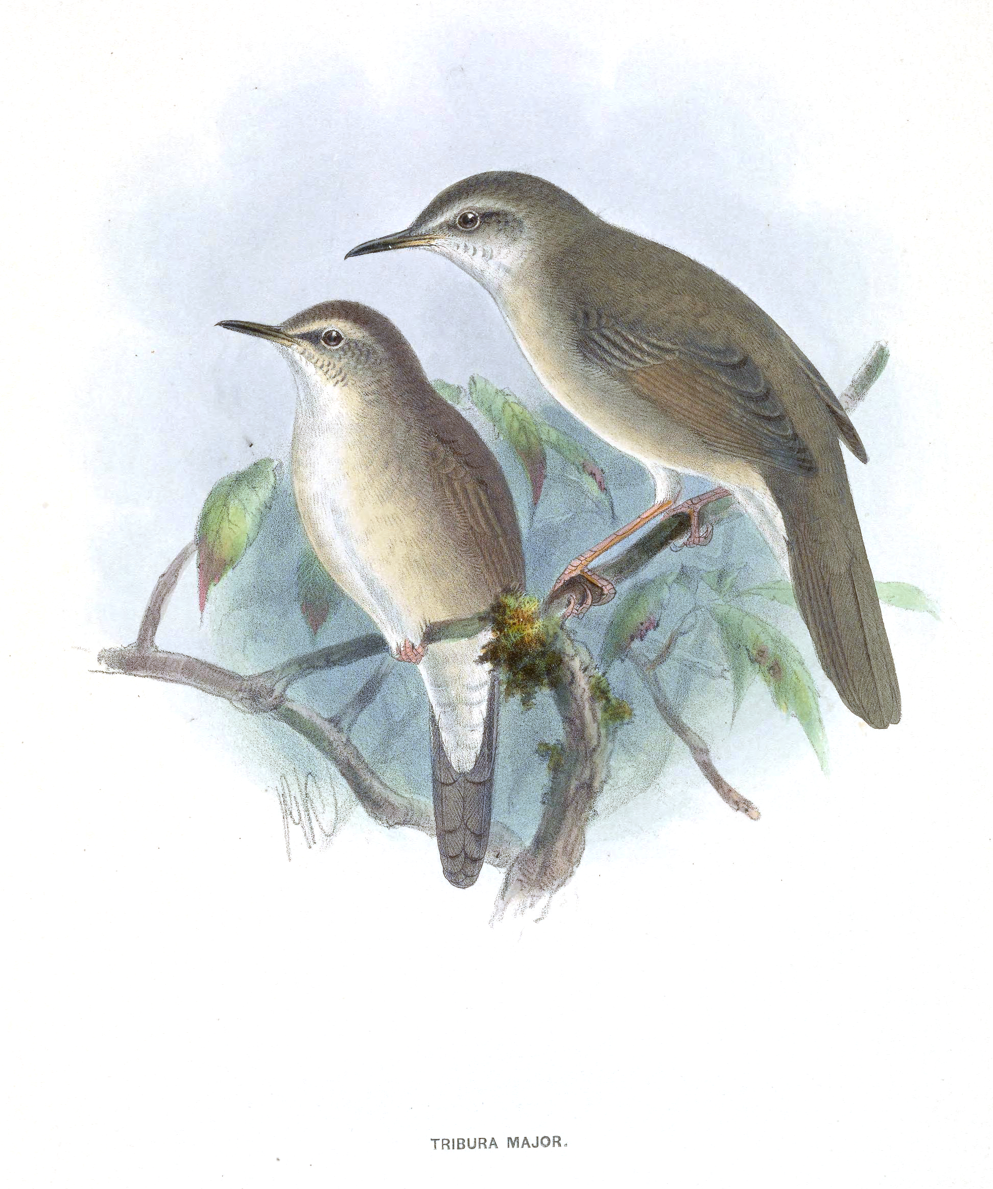 Bradypterus major